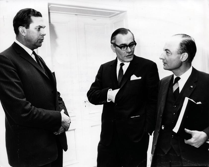 Biesheuvel (AR), J.T.Mellema (CHU) en N. Schmelzer in gesprek. Alledrie zijn fractievoorzitter van hun partij. Den Haag, Nederland, 26 februari 1968.